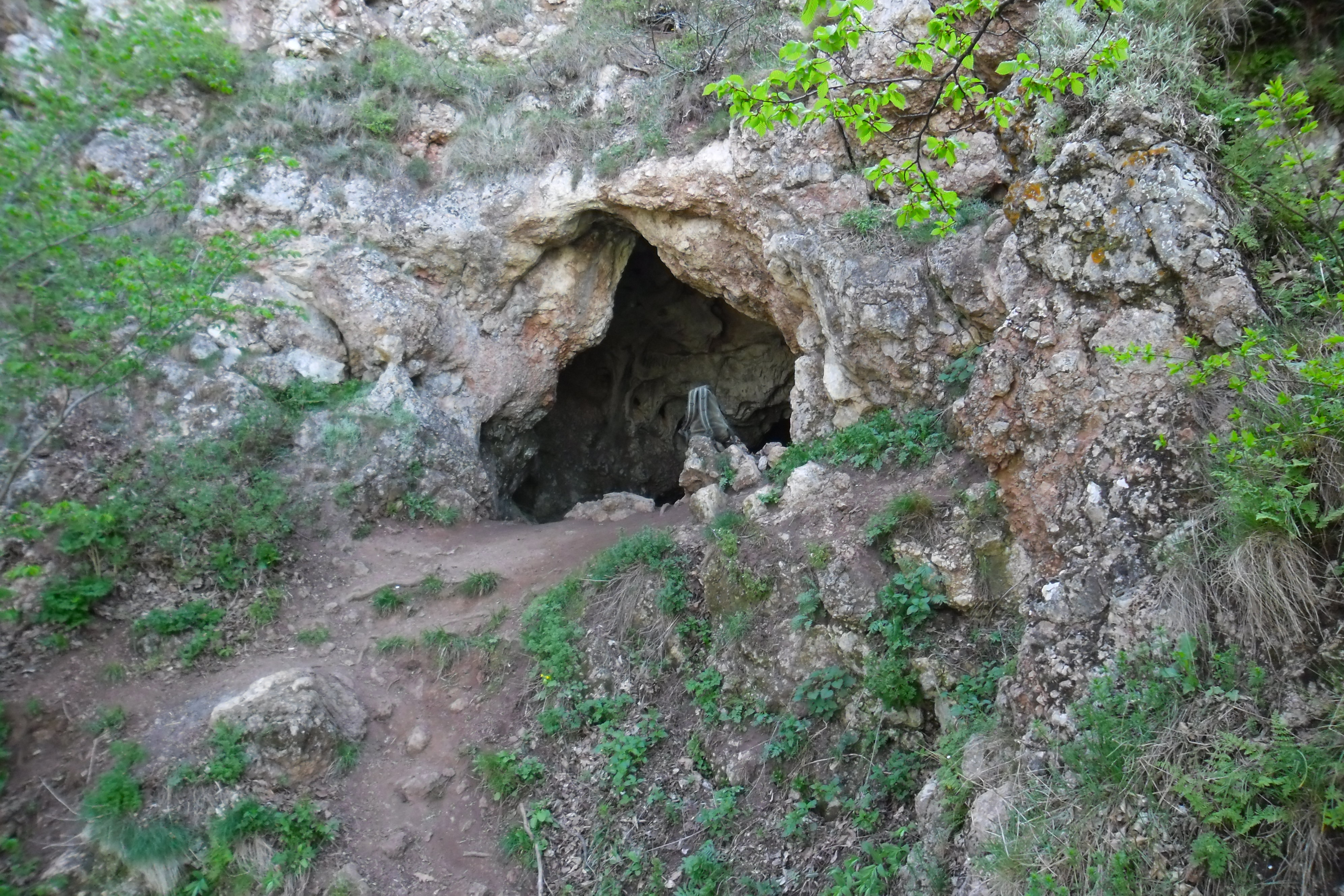 Фото